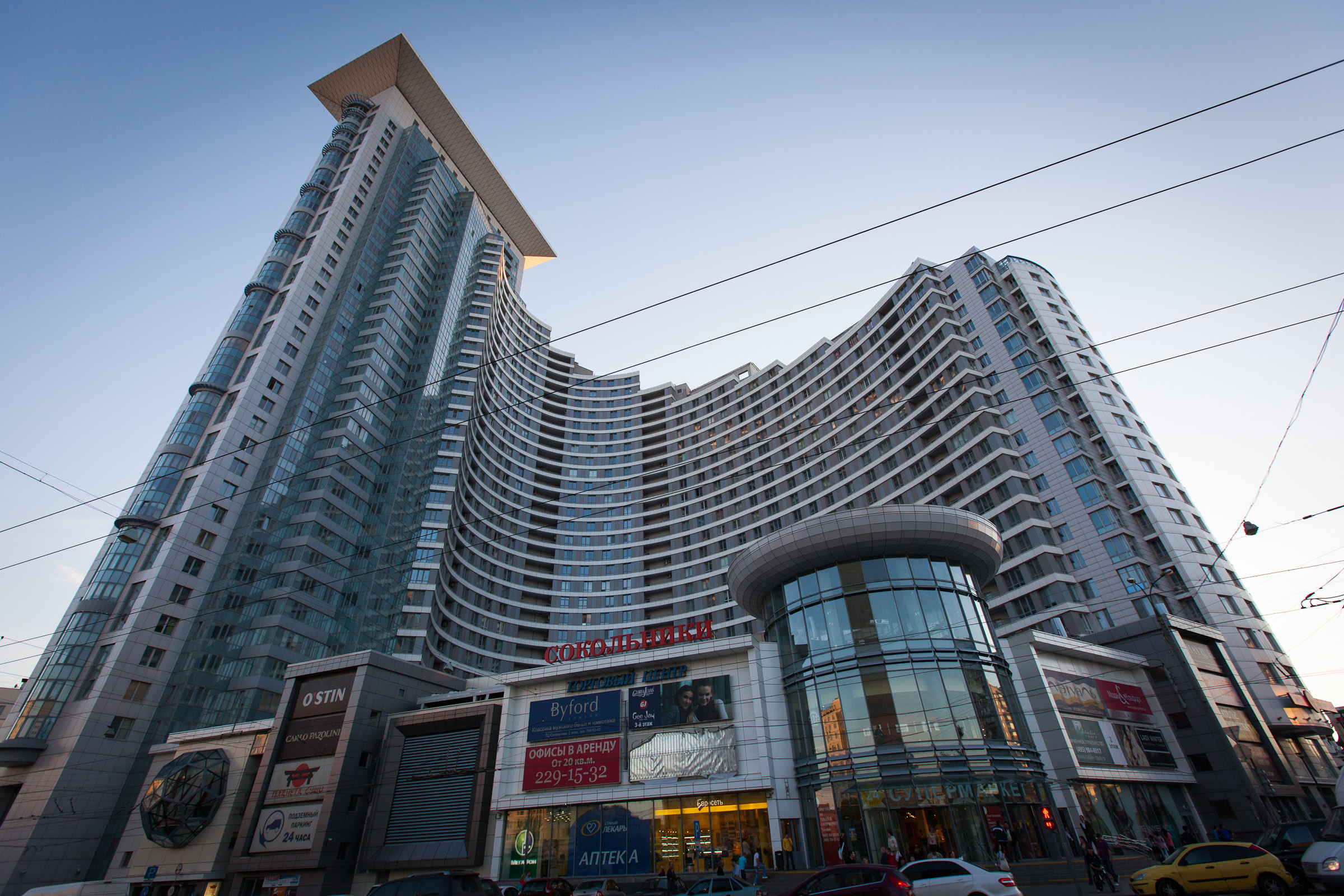 Moscow